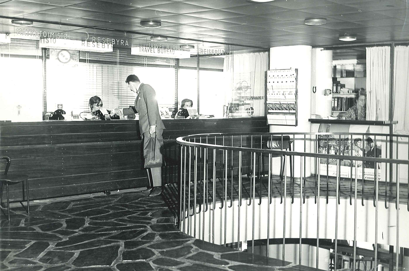 Palacen toimisto